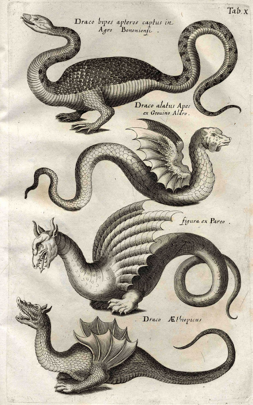 A papírsárkányok Európában a XIII. században jelentek meg, Kínában már a Kr. e. 200 körülről ismerünk papírsárkány-ábrázolásokat. A sárkányok 8–10 ezer éve szinte minden kultúrában megtalálható változatos lények.